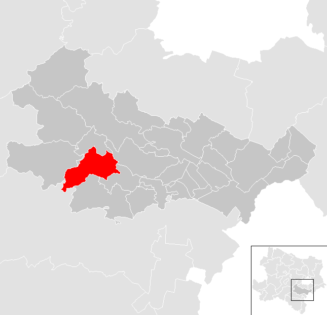 Bezirk Baden